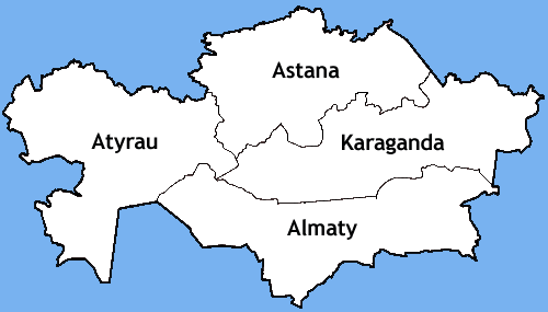 Mappa delle diocesi cattoliche del Kazakistan. Lavoro personale eseguito a partire da File:Kazakhstan_provinces_numbered_english.png di Commons. Fonte per i confini delle diocesi: Guida delle missioni cattoliche 2005, a cura della Congregatio pro gentium evangelizatione, Roma, Urbaniana University Press, 2005.